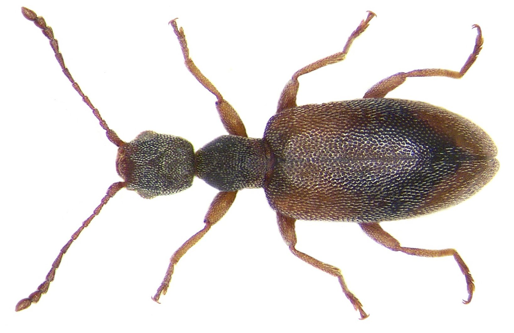 Endomia occipitalis (Dufour, 1843). Familie; Anthicidae Grösse: 3 mm Verbreitung: Südosteuropa Fundort: Jugoslavien, Montenegro, Skutari-See, Virpazar leg. U.Schmidt, 1982; det. G.Uhmann Foto: U.Schmidt, 2006